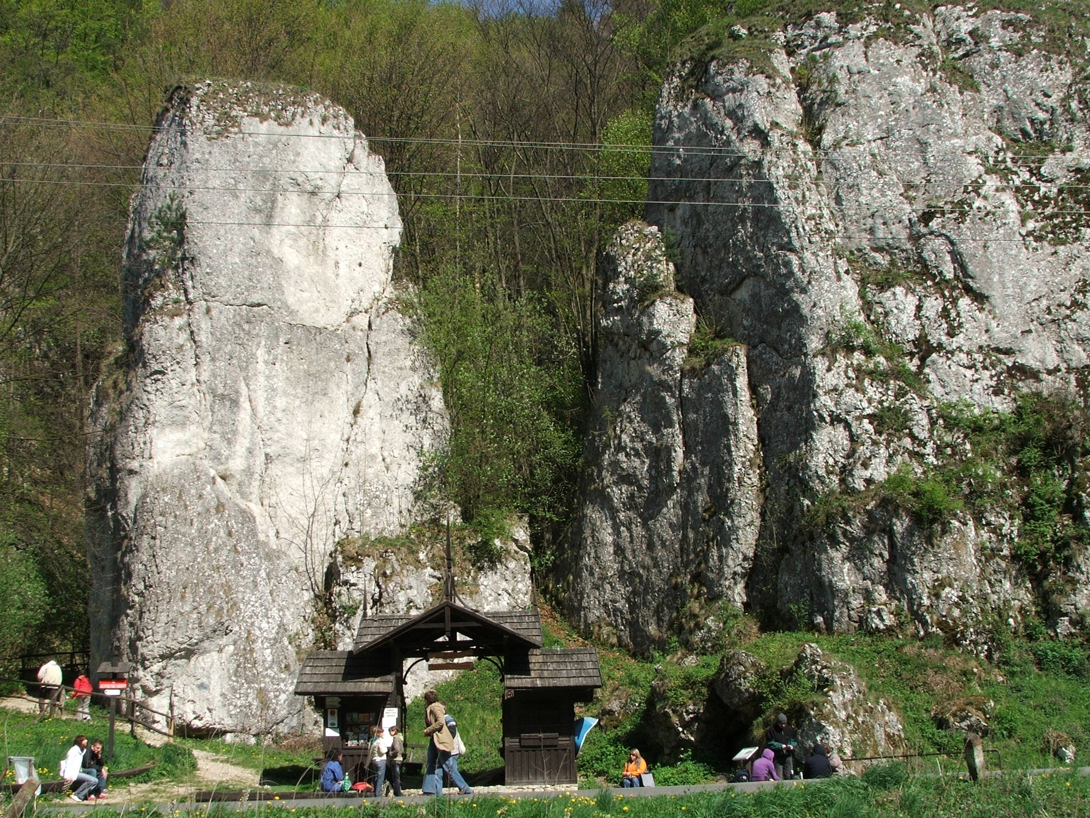 Dolina Prądnika (Ojcowski Park Narodowy)